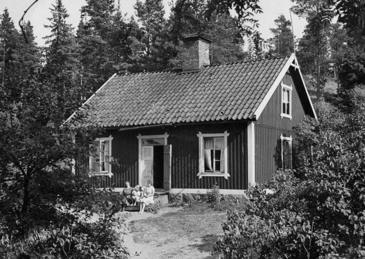 Nedre Flottsbro, torp under Elvesta. Flyttades då Flottsbrokanalens sträckning ändrades år 1900.